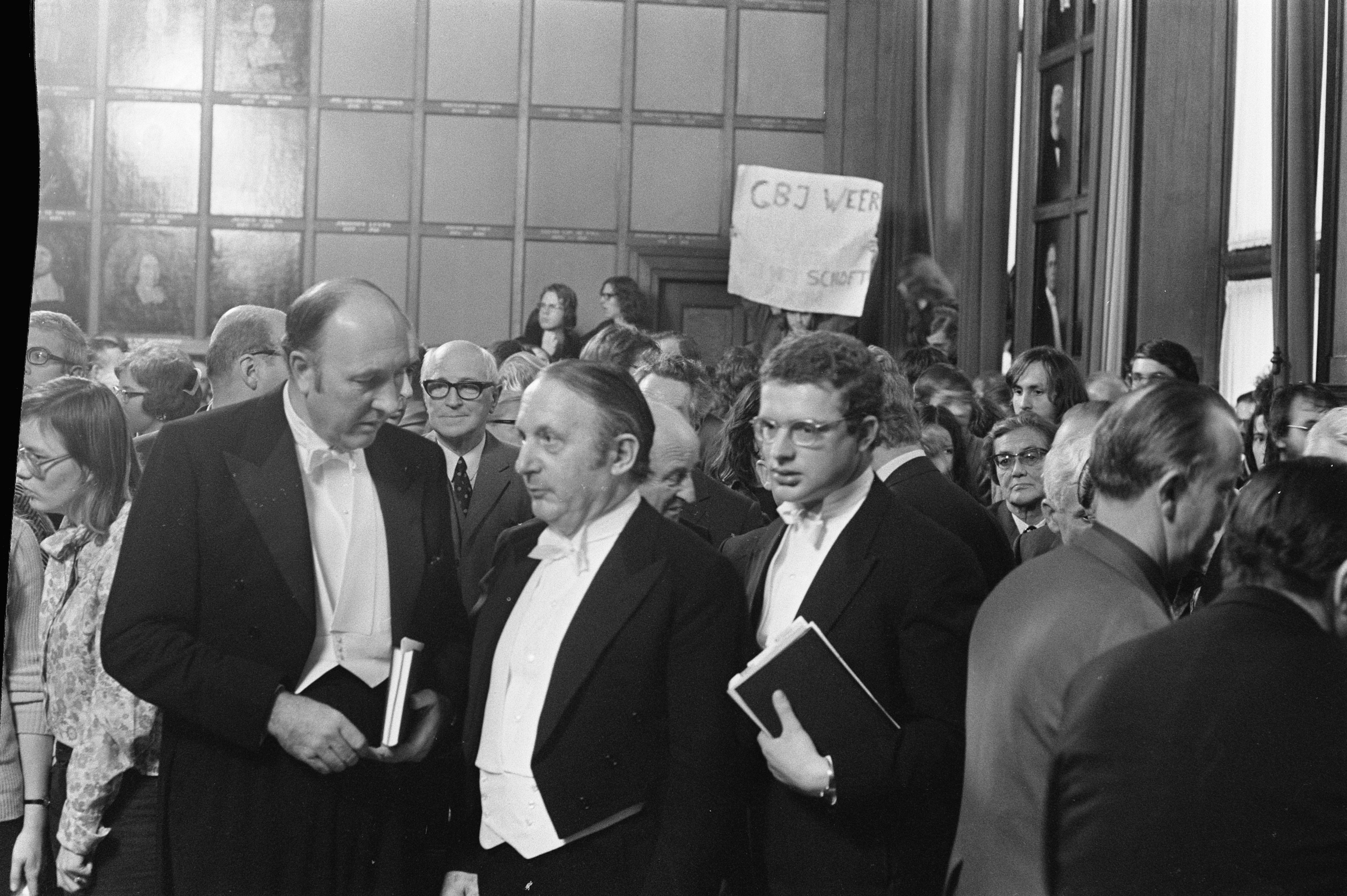 Collectie / Archief : Fotocollectie Anefo Reportage / Serie : [ onbekend ] Beschrijving : Mr. G. B. J. Hiltermann promoveert aan Utrechtse Universiteit Datum : 10 november 1972 Locatie : Utrecht Trefwoorden : promoties, universiteiten Fotograaf : Verhoeff, Bert / Anefo Auteursrechthebbende : Nationaal Archief Materiaalsoort : Negatief (zwart/wit) Nummer archiefinventaris : bekijk toegang 2.24.01.05 Bestanddeelnummer : 926-0141